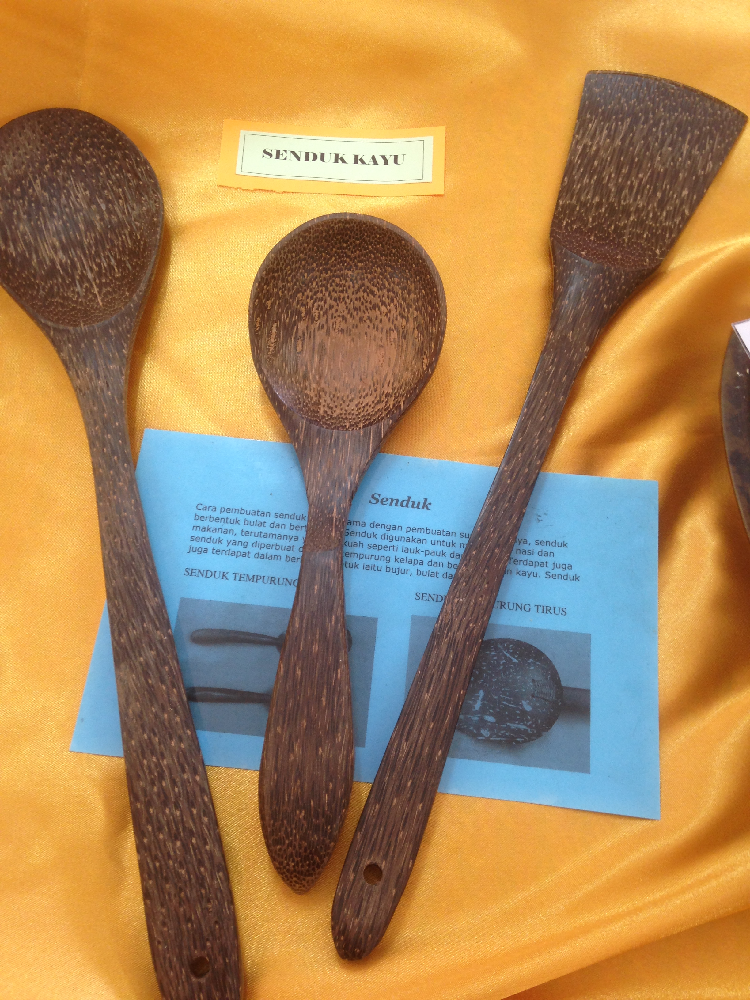 SENDUK KAYU